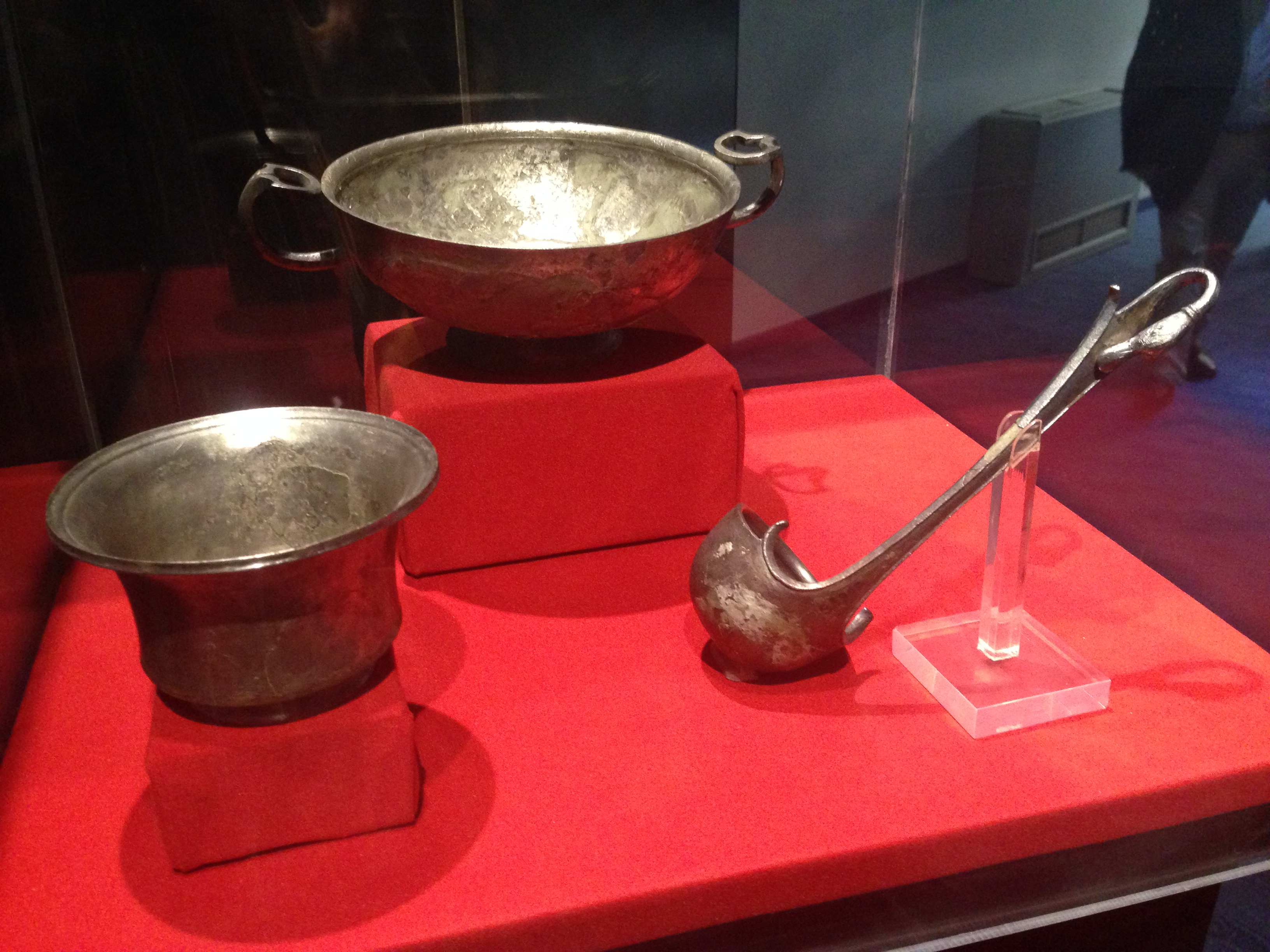 Vaso, coppa e mestolo in argento di Megara Hyblaea. Collezione British museum (esposizione temporanea al Museo Paolo Orsi, ottobre 2015)